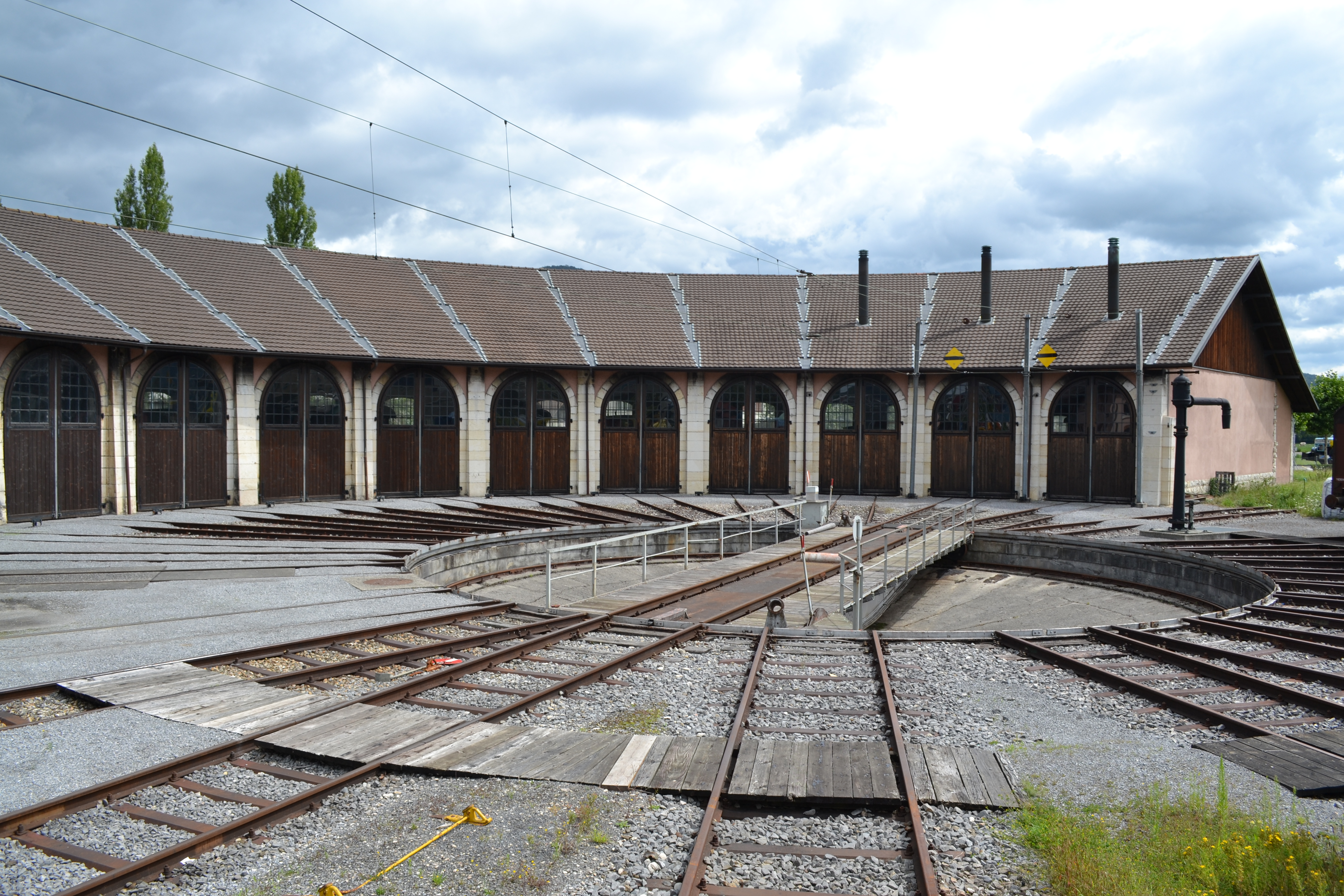 Rotonde ferroviaire de Delémont